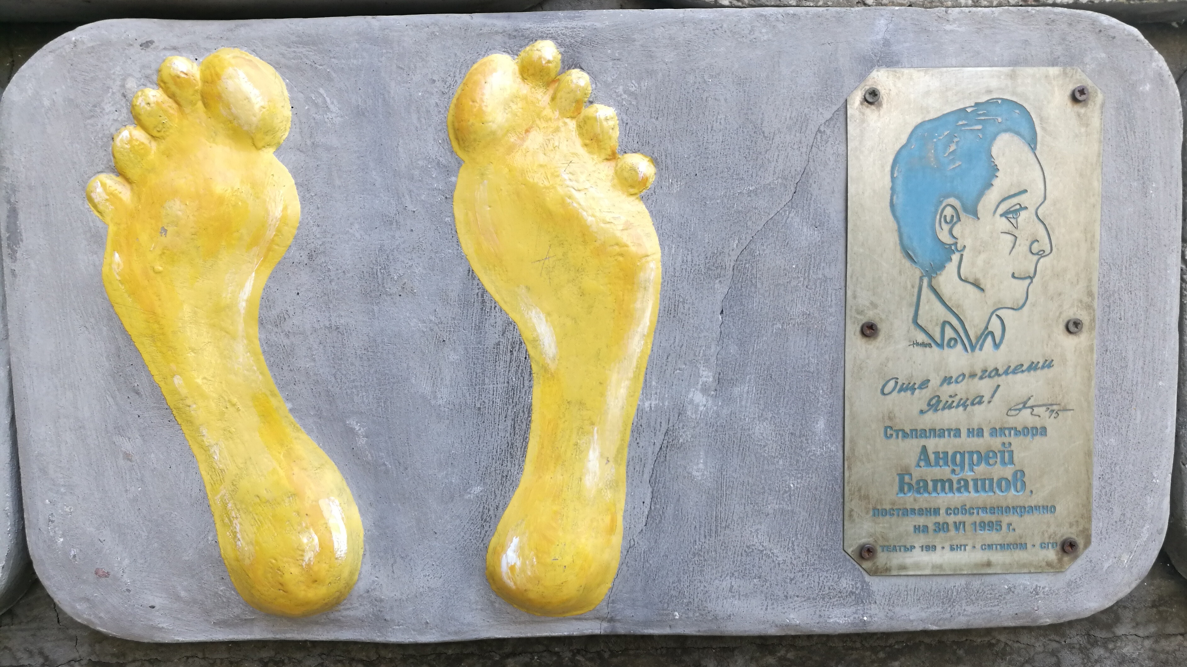 Стената на славата пред Театър 199 - пано с отпечатъци, послание и шарж на Андрей Баташов.